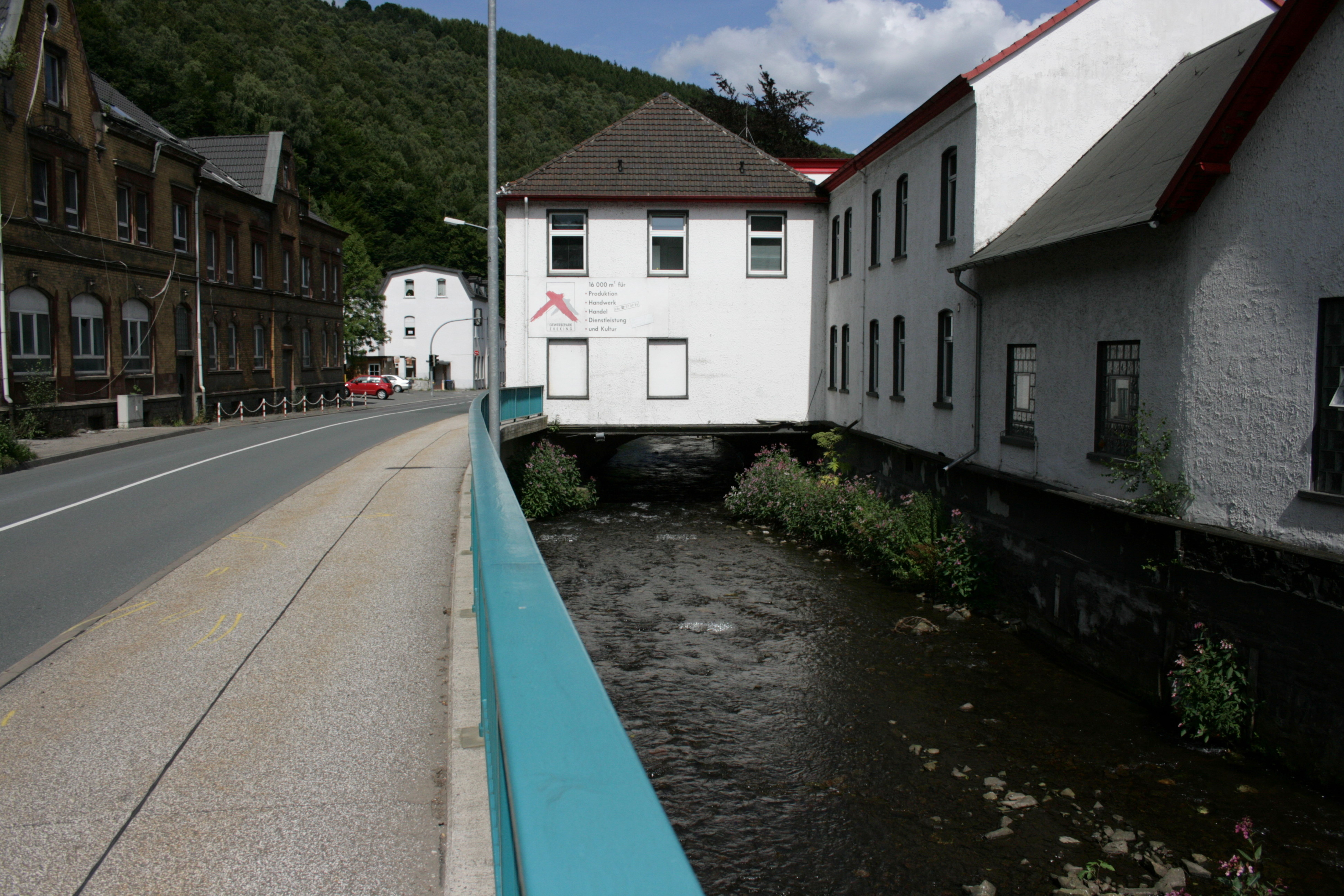 Hauptstraße in Werdohl-Eveking